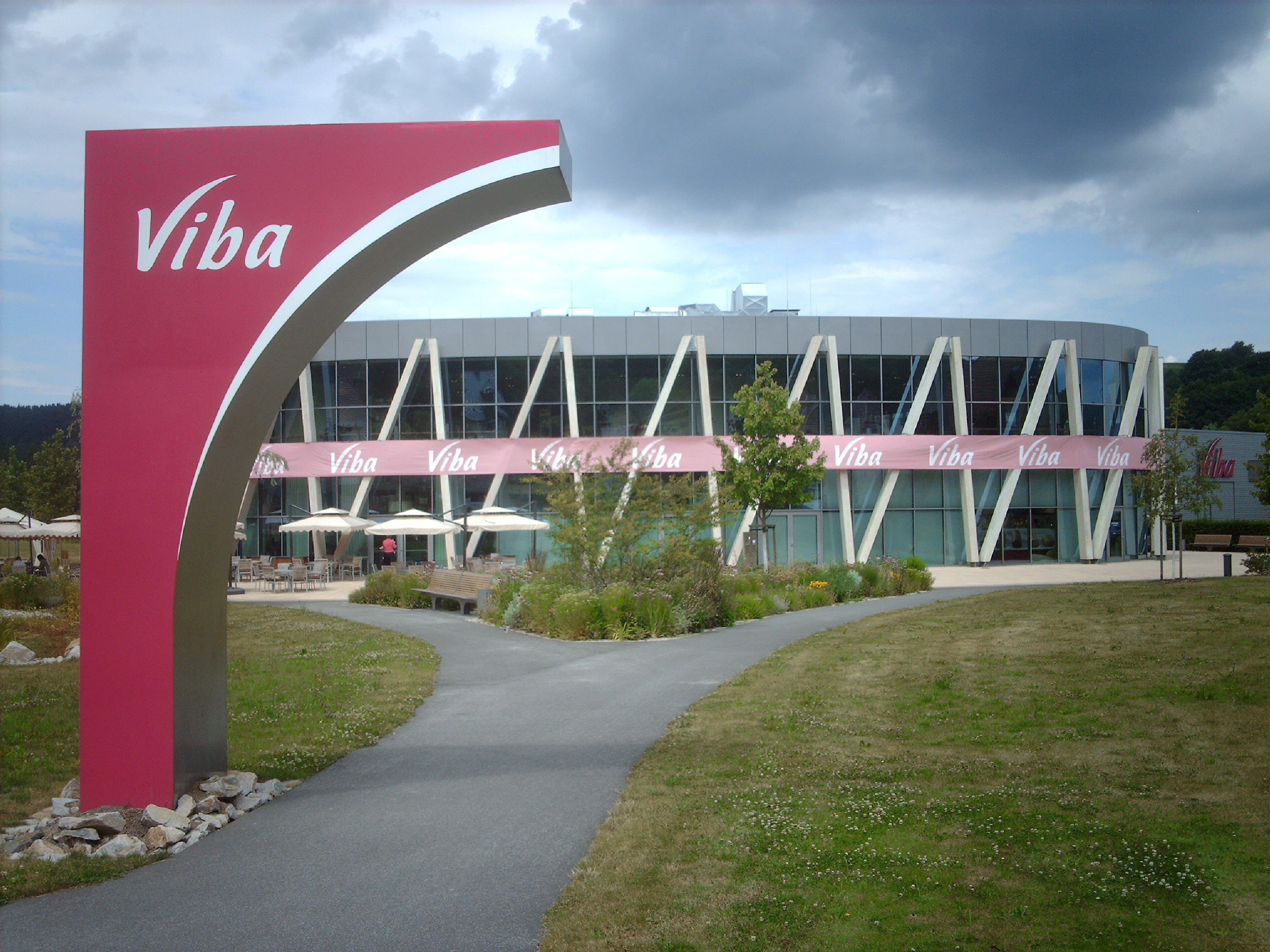 Viba Nougat-Welt in Schmalkalden